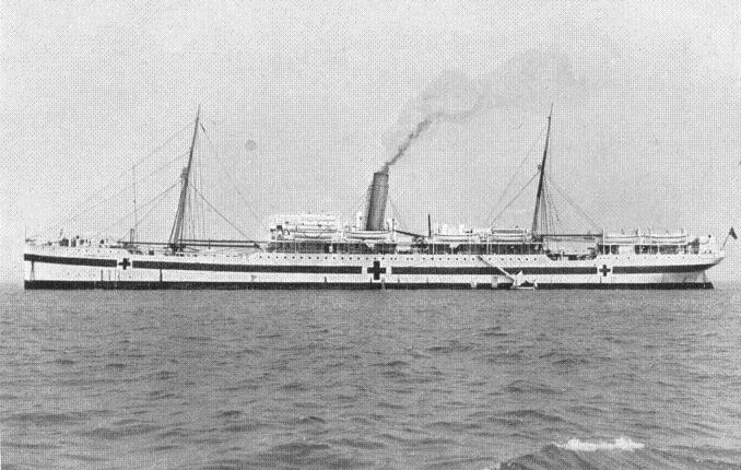 Glenart Castle